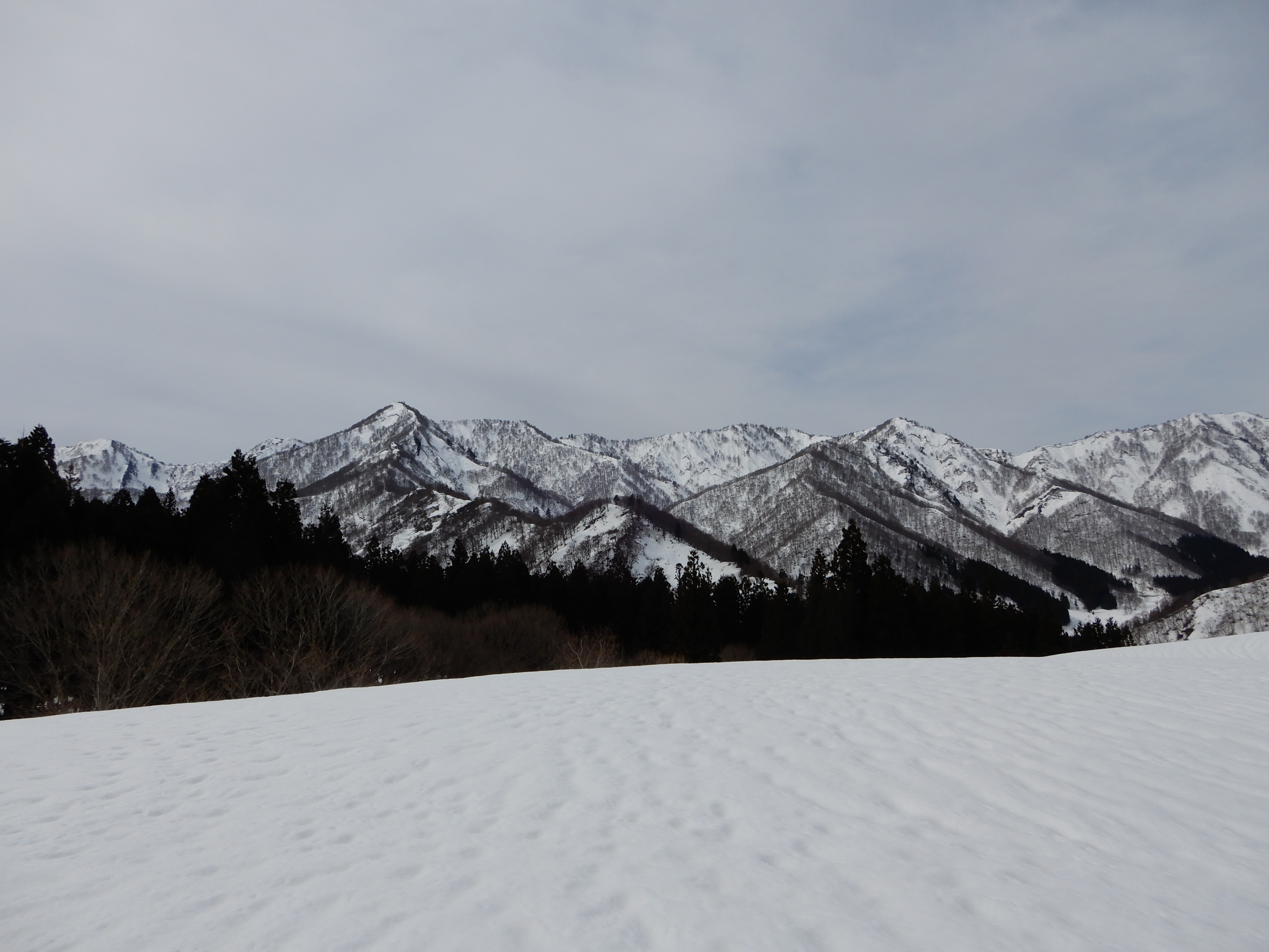 高平ノ頭 2019-03-26